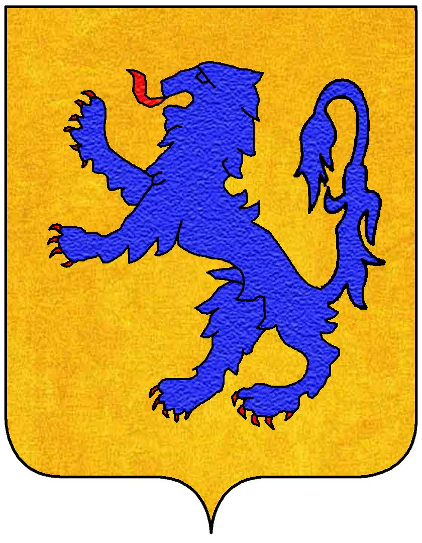 Stemma della famiglia Caracciolo